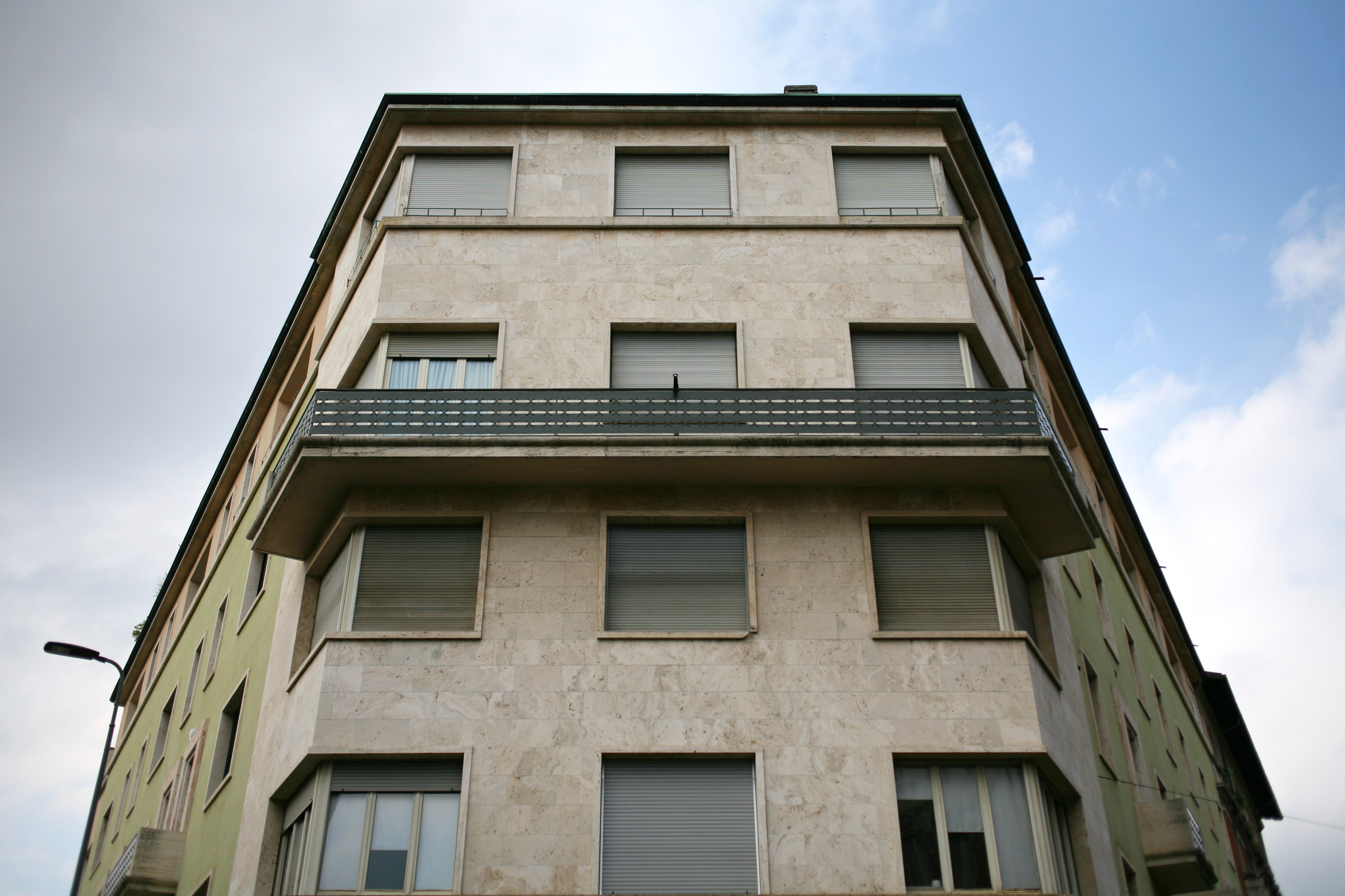 Casa Lentati, Milano; veduta prospettica della facciata